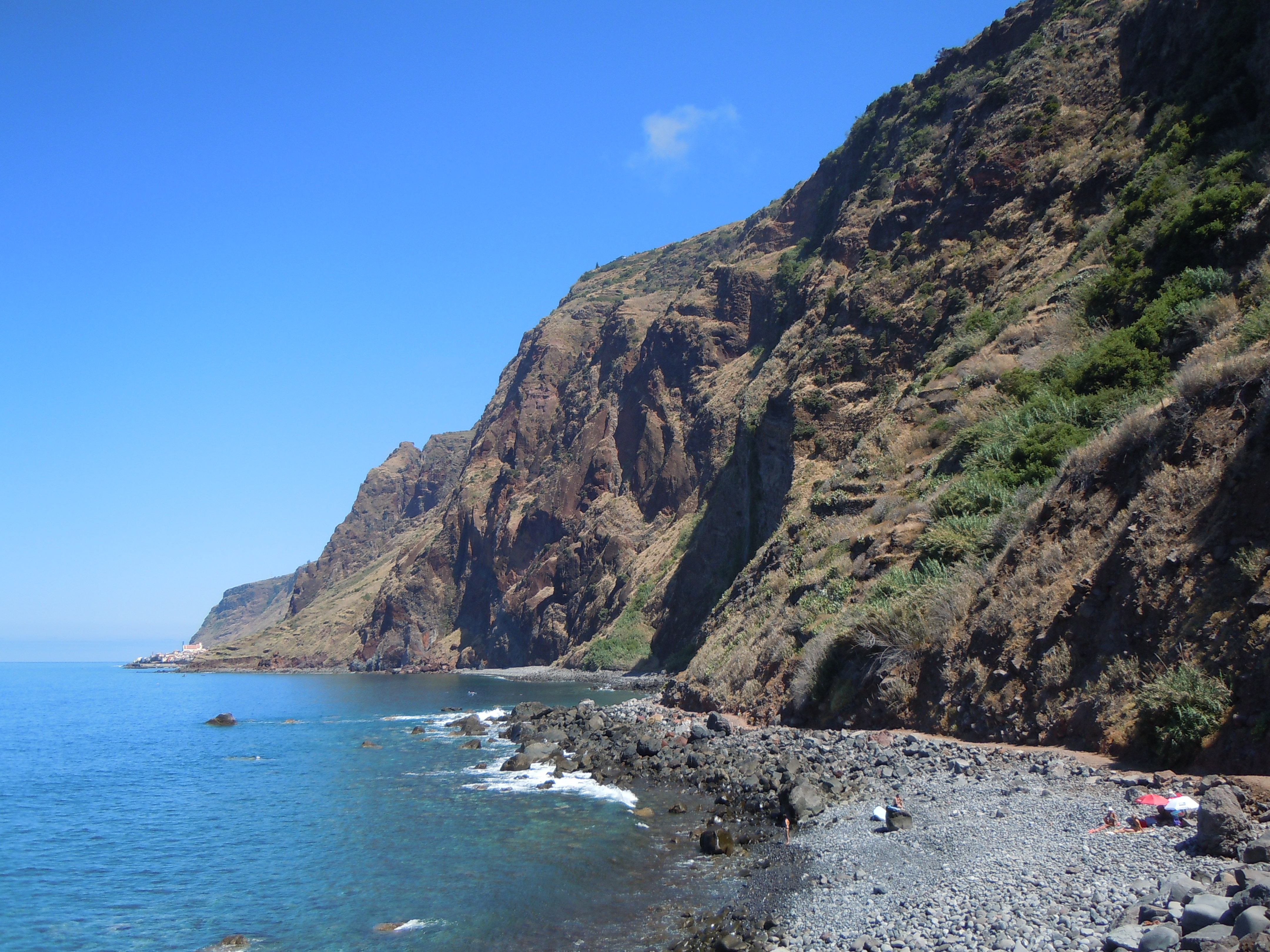 Plage et falaises à l'ouest de Jardim do Mar, Madère